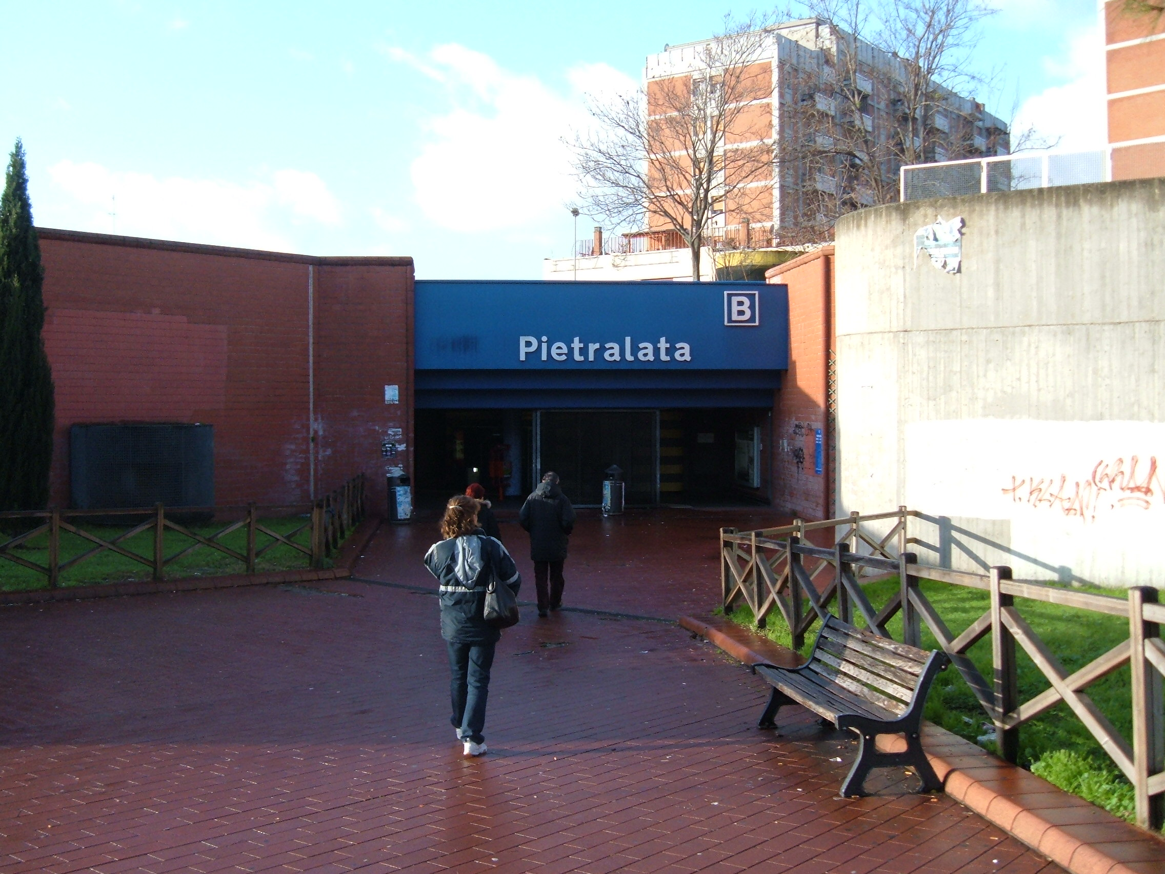 Metro B di Roma: stazione Pietralata.